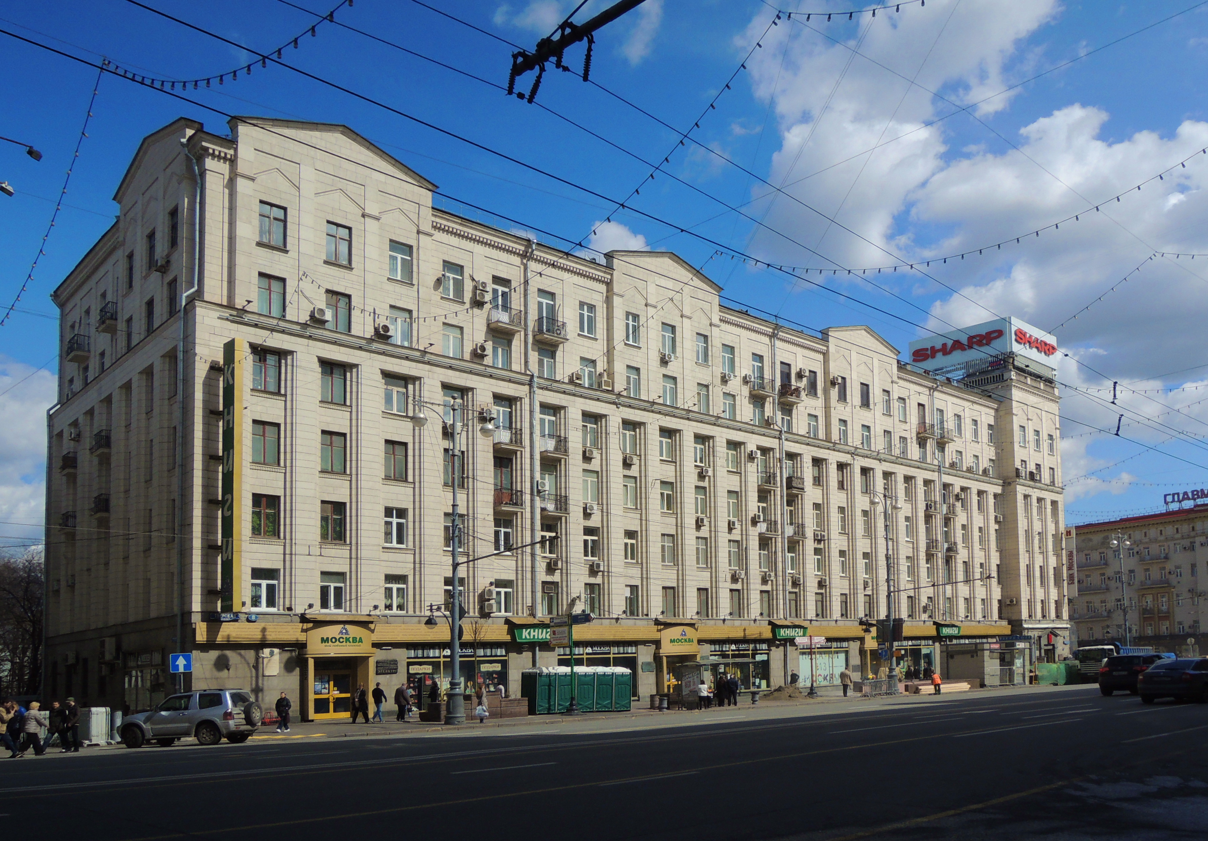 Тверская улица